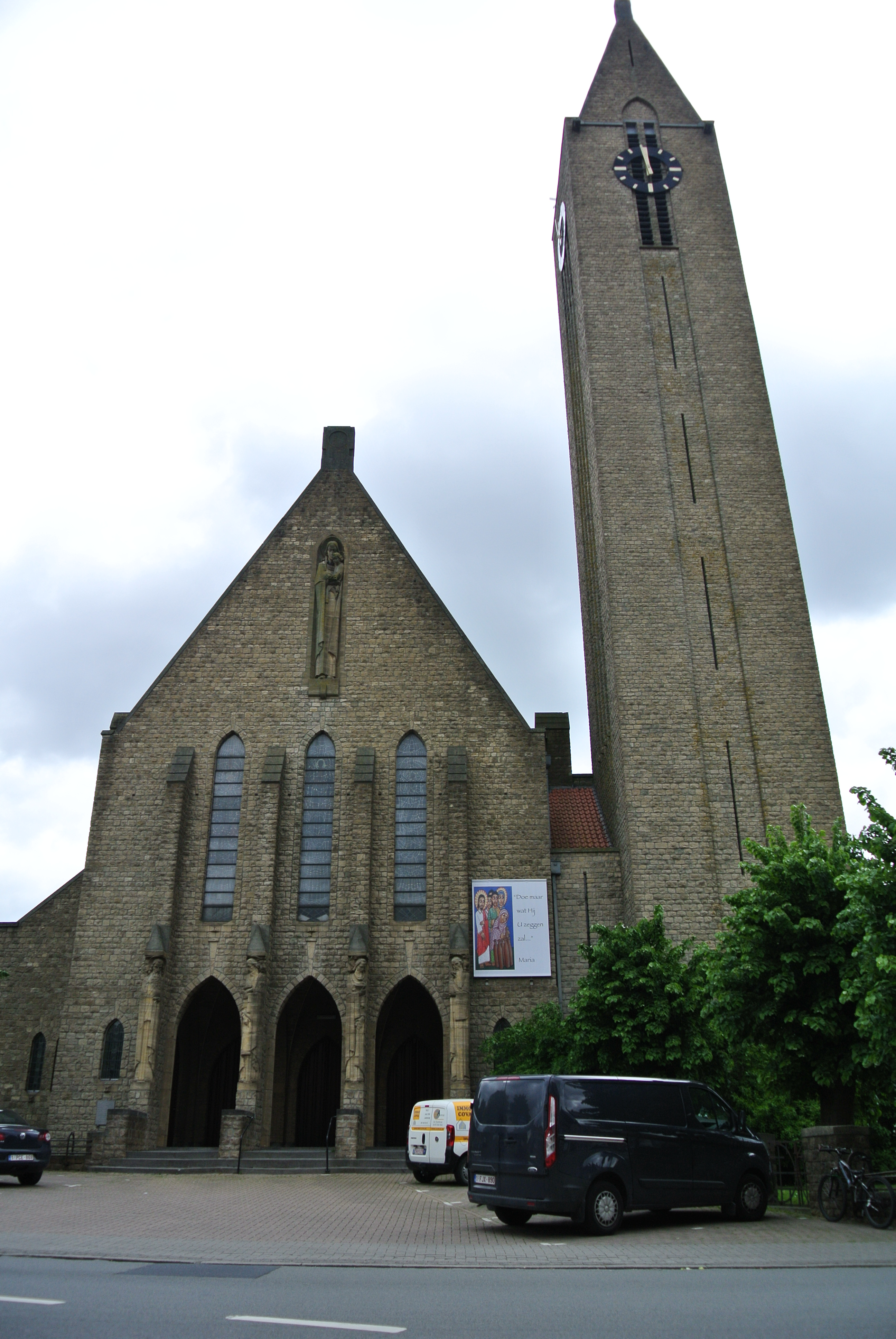 Onze-Lieve-Vrouwekerk in de Stationsstraat te Tielt - Parochiekerk